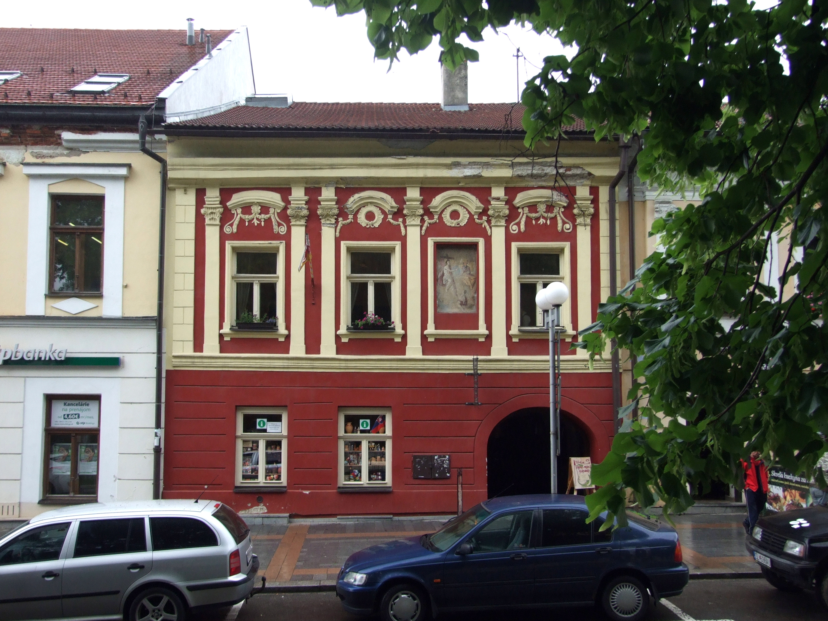 Dom meštiansky, nám. sv. Mikuláša 21